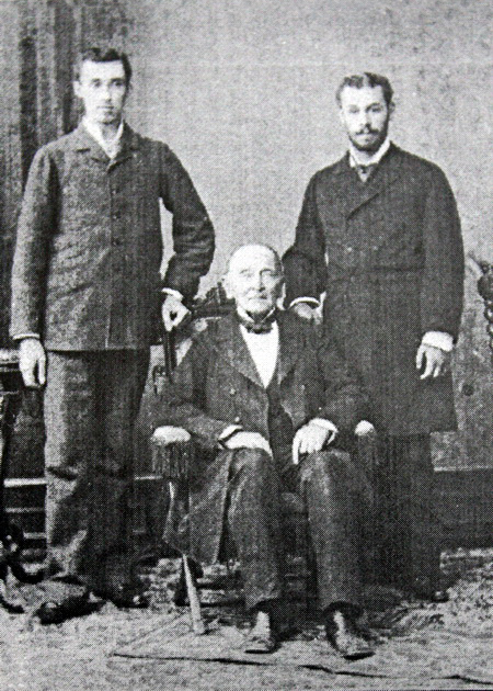 Ignacio Domeyko Ancuta (en polaco: Ignacy Domeyko, en bielorruso: Ігнат Дамейка (Ihnat Damiejka)) (Niedźwiadka Wielka, Imperio Ruso, 31 de julio de 1802- Santiago, Chile 23 de enero de 1889) fue un científico bielorruso-chileno. Bielorruso de nacimiento, Chile le concedió la nacionalidad por gracia en 1848.